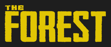 Logo von The Forest